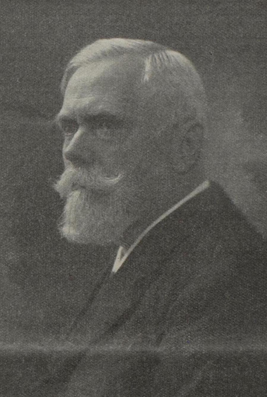 Porträtfoto von Oskar Hossfeld